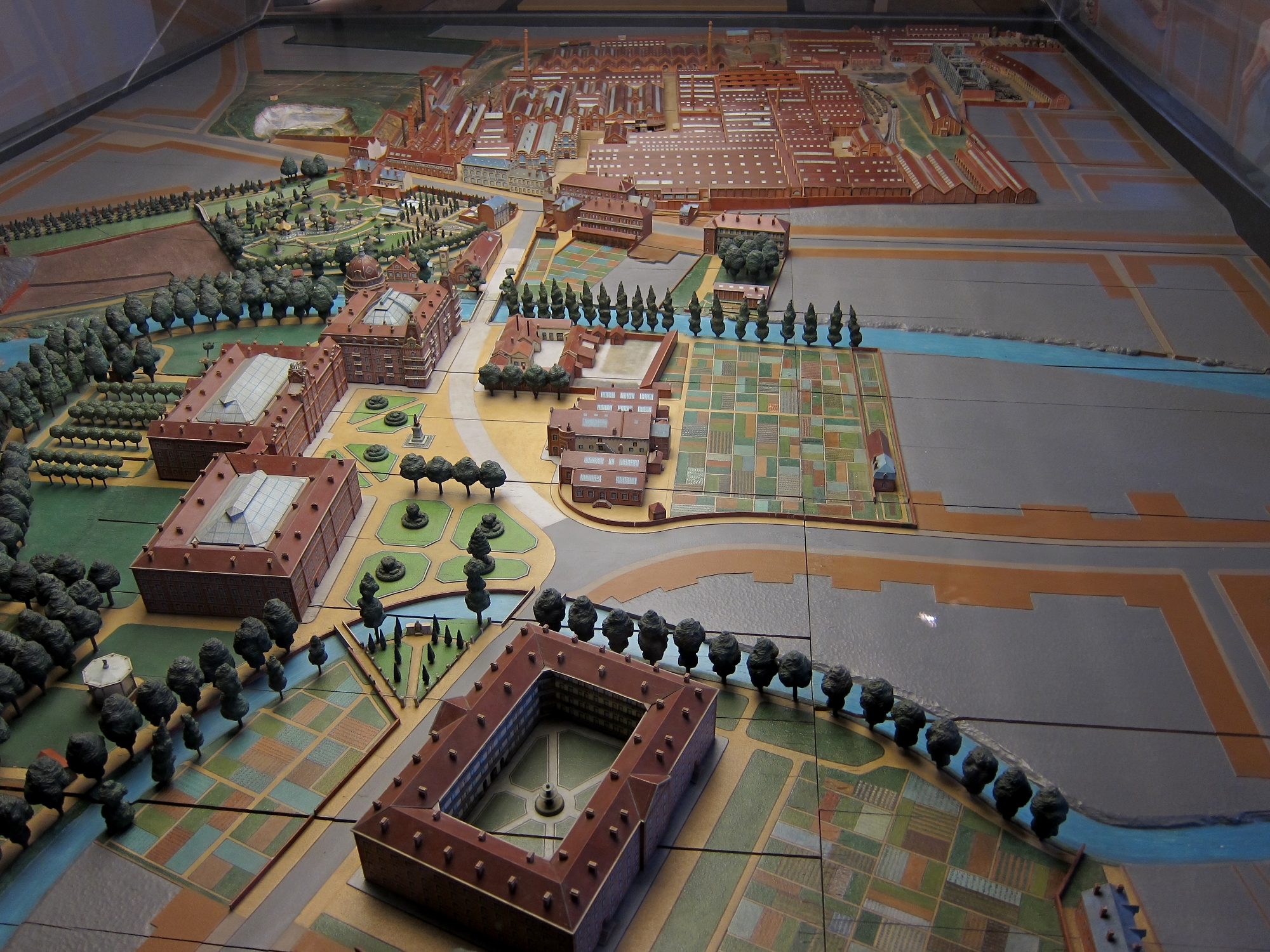 Plan relief du familistère de Guise (Aisne) réalisé en 1931.